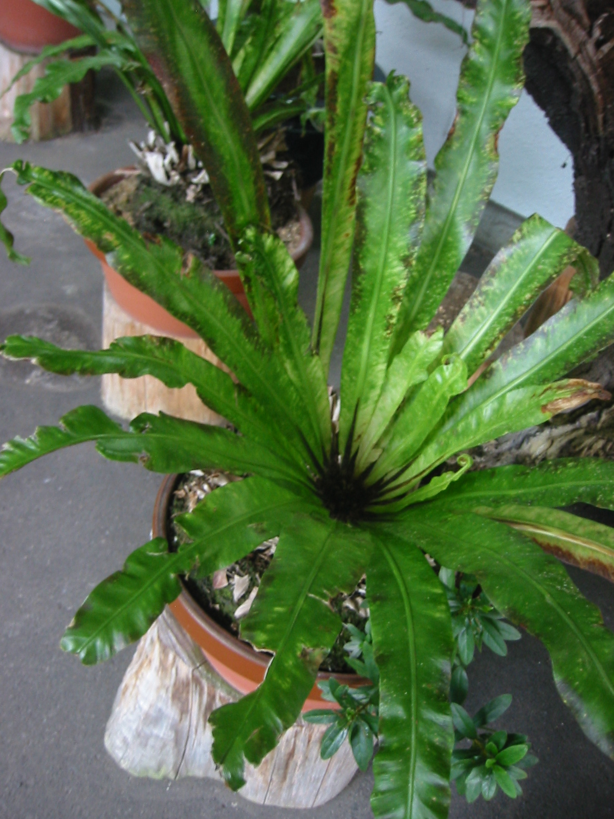 大谷渡 串本駅 オオタニワタリ